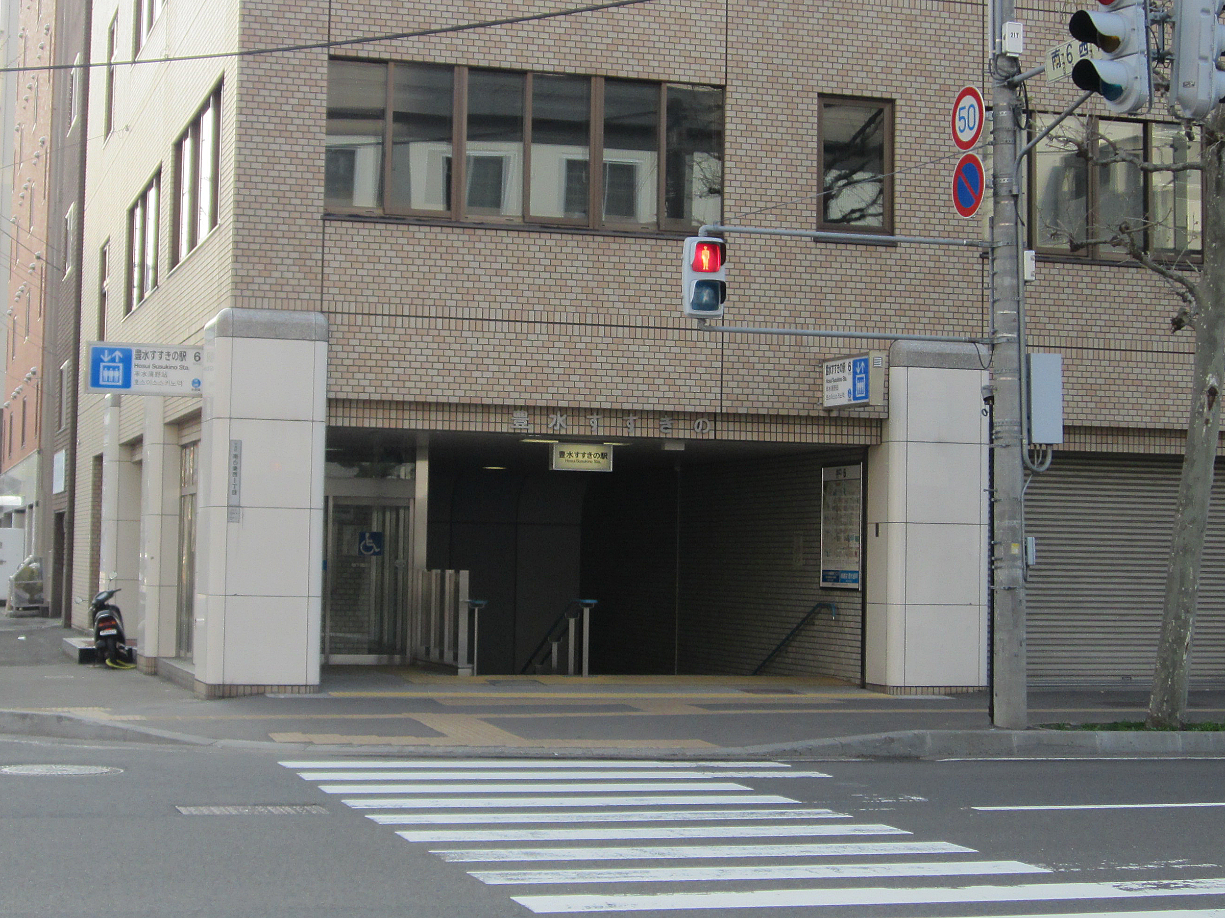 札幌市営地下鉄東豊線豊水すすきの駅6番出入口